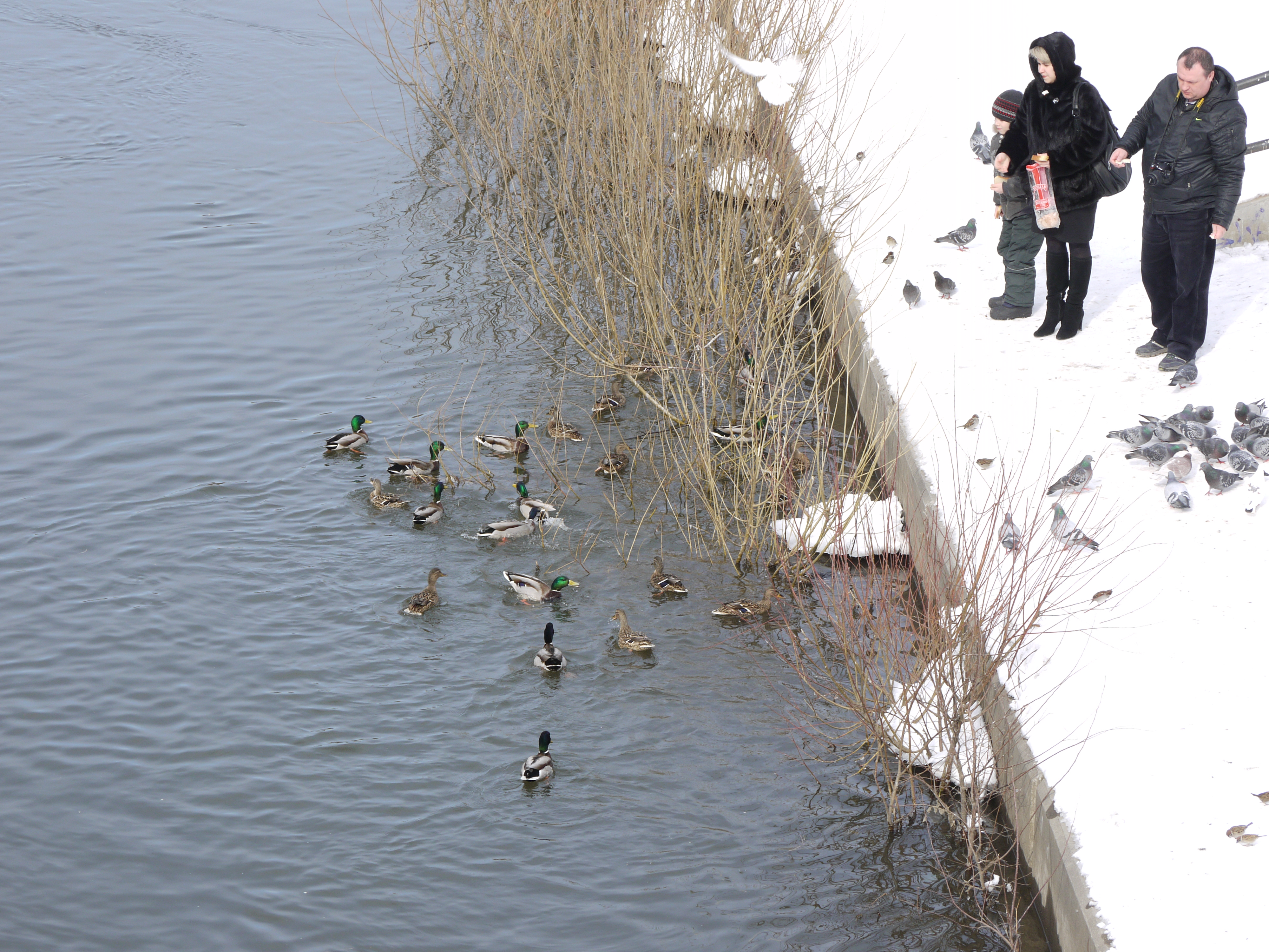 Утки, зимующие в Екатеринбурге, около моста на ул. Малышева через реку Исеть